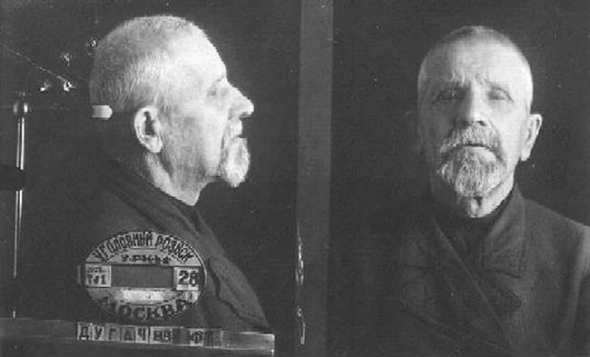 Дугачев Федор Михайлович (1867-1938)